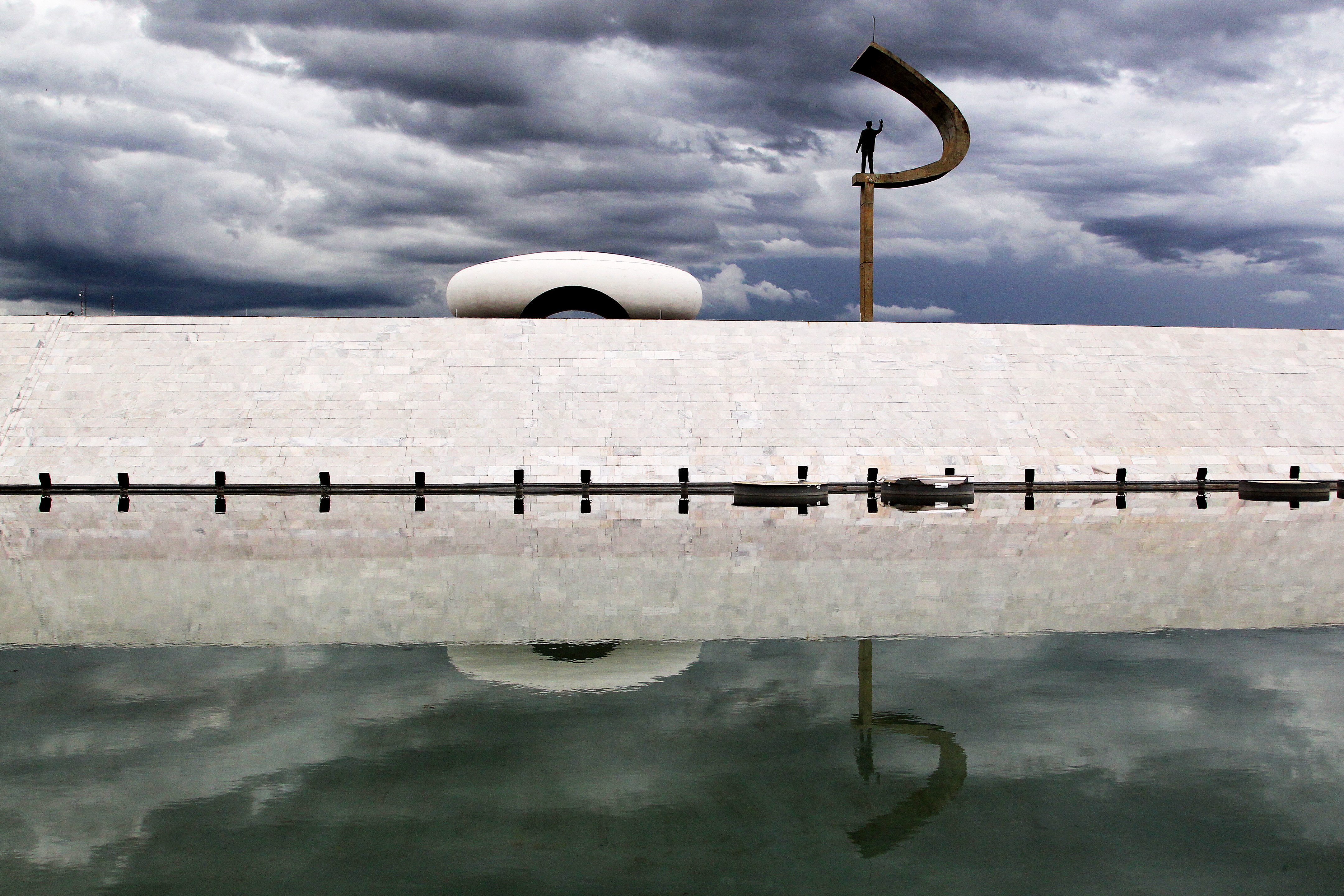 Memorial JK, Brasília, DF, Brasil 24/2/2017 Foto: Toninho Tavares/Agência Brasília.